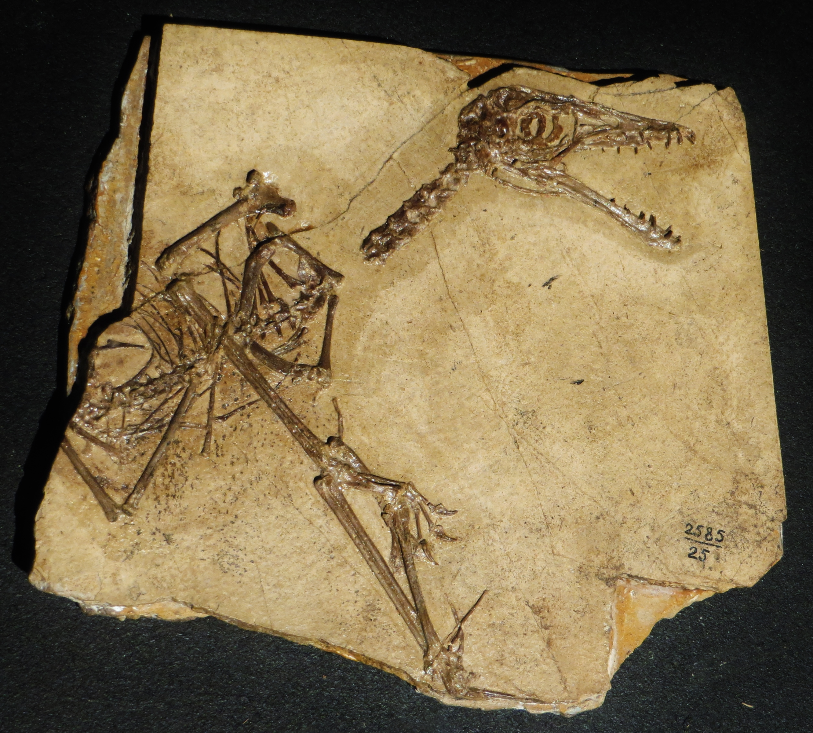 Fossil of Sordes, an extinct reptile- Took the picture at Dinosaurium, Prague